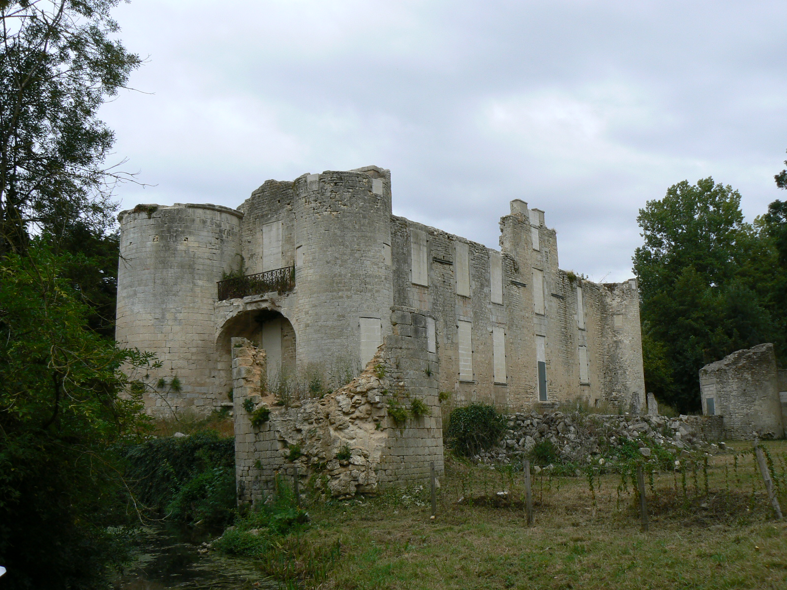 Château de Mursay, à Échiré (Deux-Sèvres, France) .